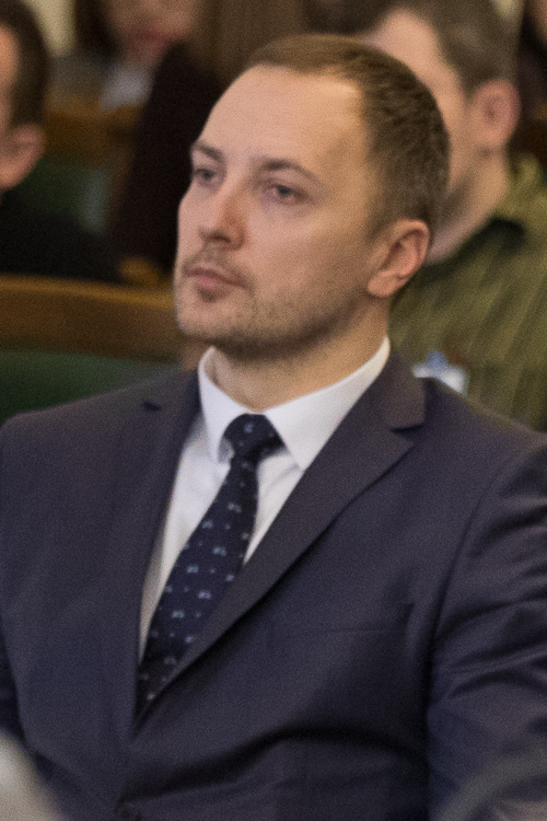 2019.gada 23.janvāris. Krišjāņa Kariņa valdības apstiprināšana Saeimas ārkārtas sēdē. Foto: Ernests Dinka, Saeima Izmantošanas noteikumi: saeima.lv/lv/autortiesibas